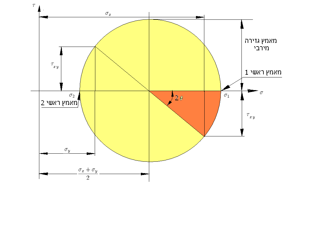 מעגל מור למצב מאמצים מישורי. הכין י.ש. 12:30, 8 יוני 2006 (IDT)